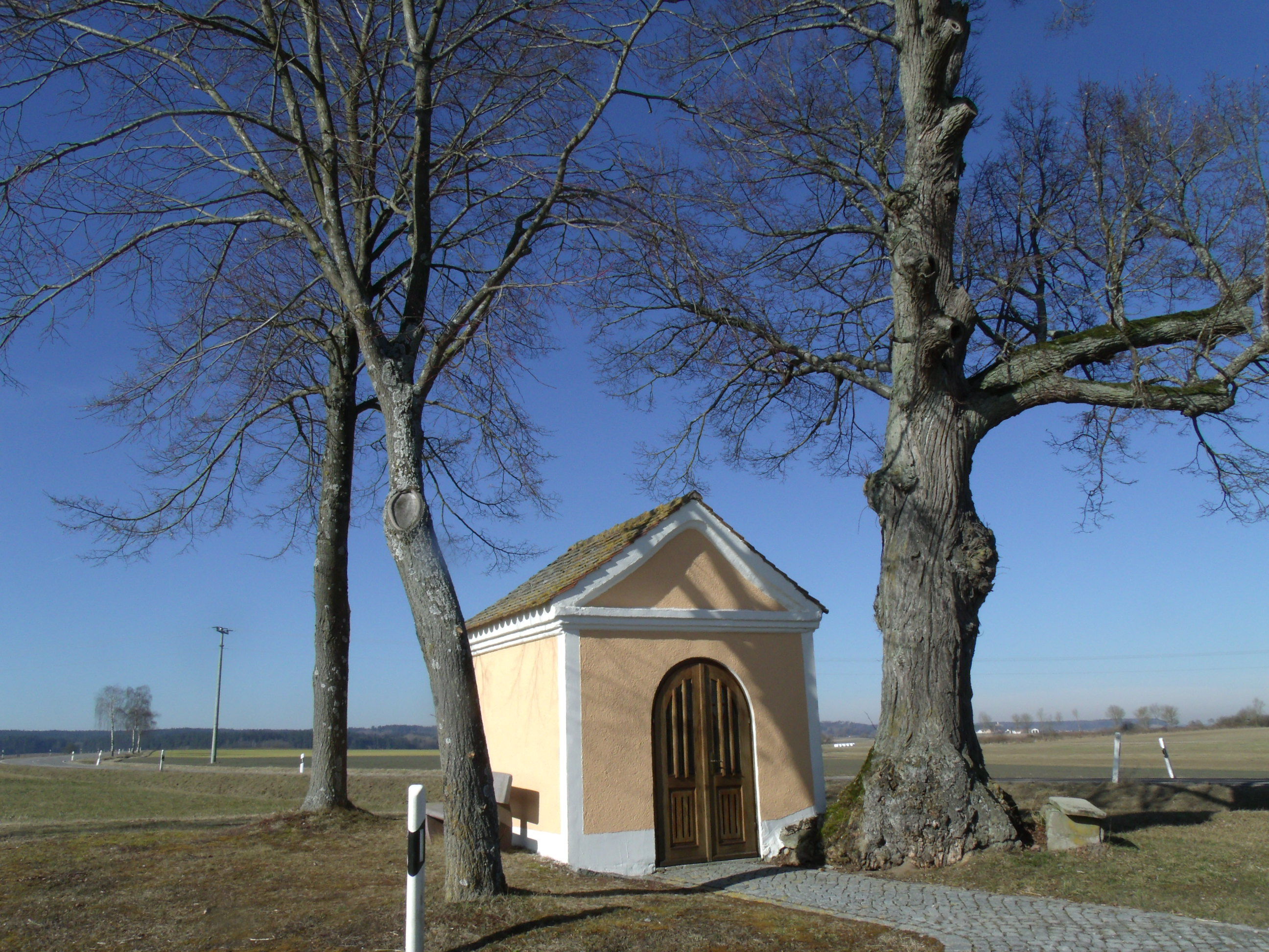 Marienkapelle bei Brünst, einem Ortsteil der Stadt Herrieden im mittelfränkischen Landkreis Ansbach